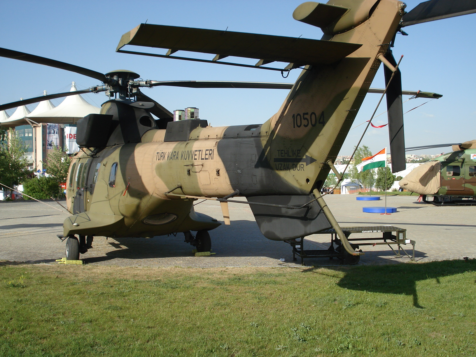 IDEF '07 Savunma Fuarı'nda çekildi.AS-532 Cougar.23 Mayıs 2007